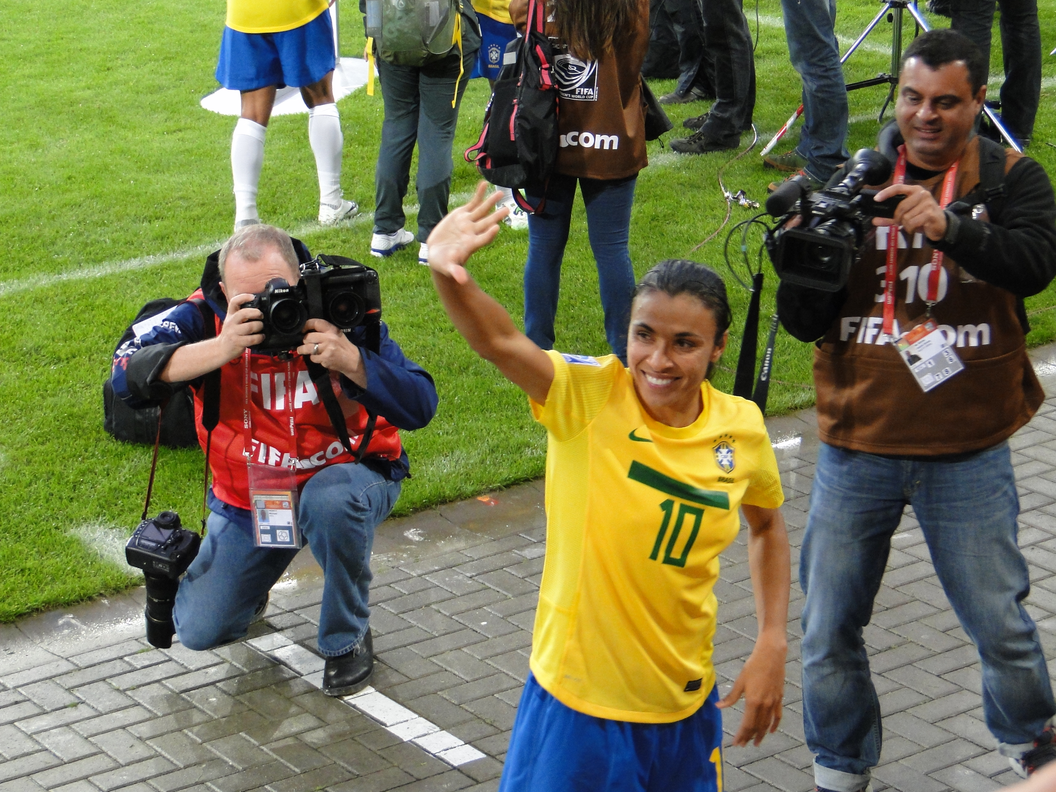 Marta Vieira da Silva - Match de phase de groupes de la coupe du monde entre le Brésil et la Norvège le 3 juillet 2011 à Wolfsbourg